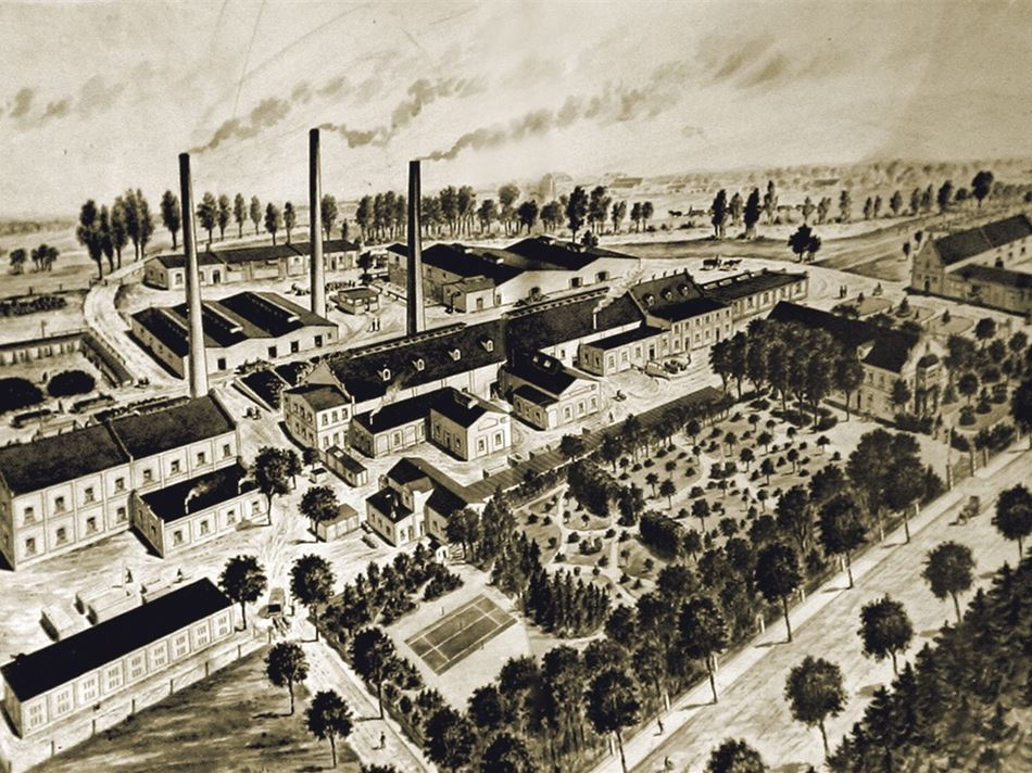 Alte Ansicht der Zinkweißhütte Bernsdorf um 1910